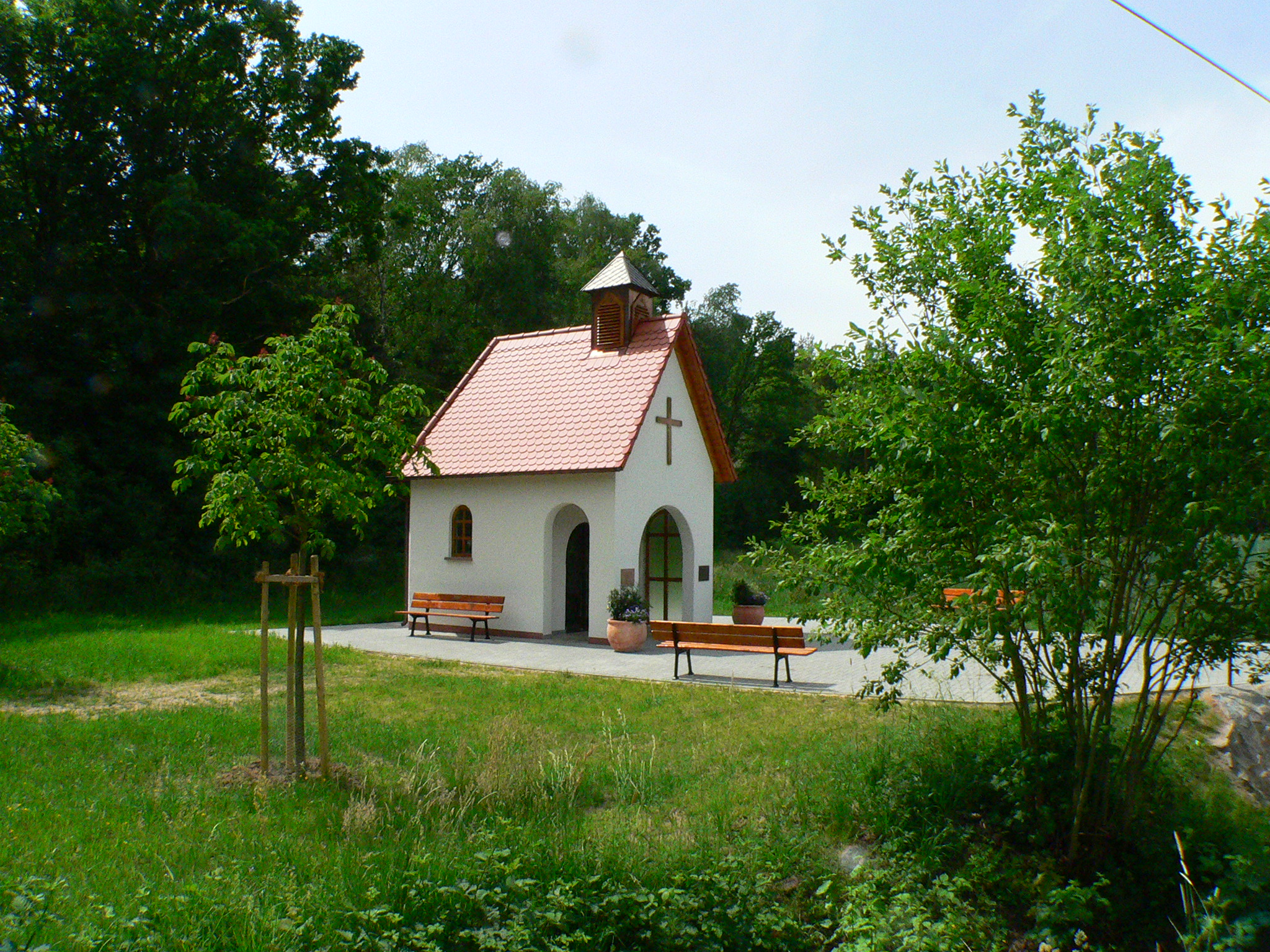 St. Anna-Kapelle in Stockstadt am Main, Deutschland